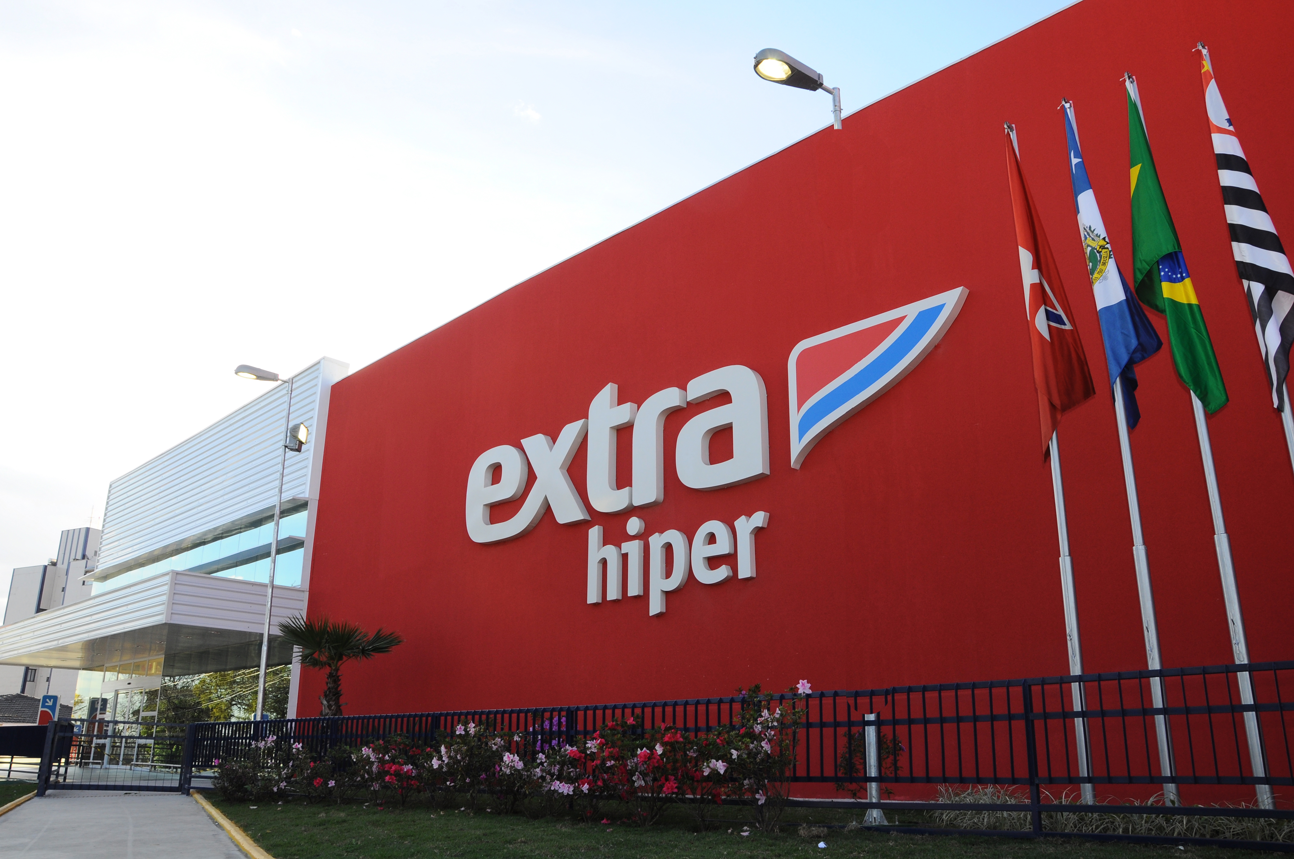 Foto da fachada da loja.